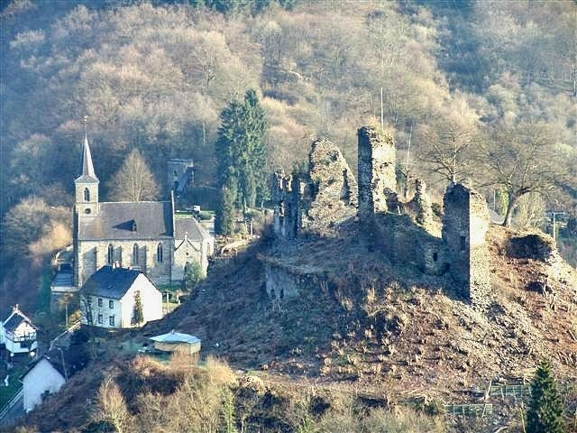 Historisches Ensemble: Ruine der Isenburg, altes Schulhaus, Pfarrkirche, im Hintergrund die Schildpforte. Aus dem Eigenbesitz des Fotografen, Digitalfotografie